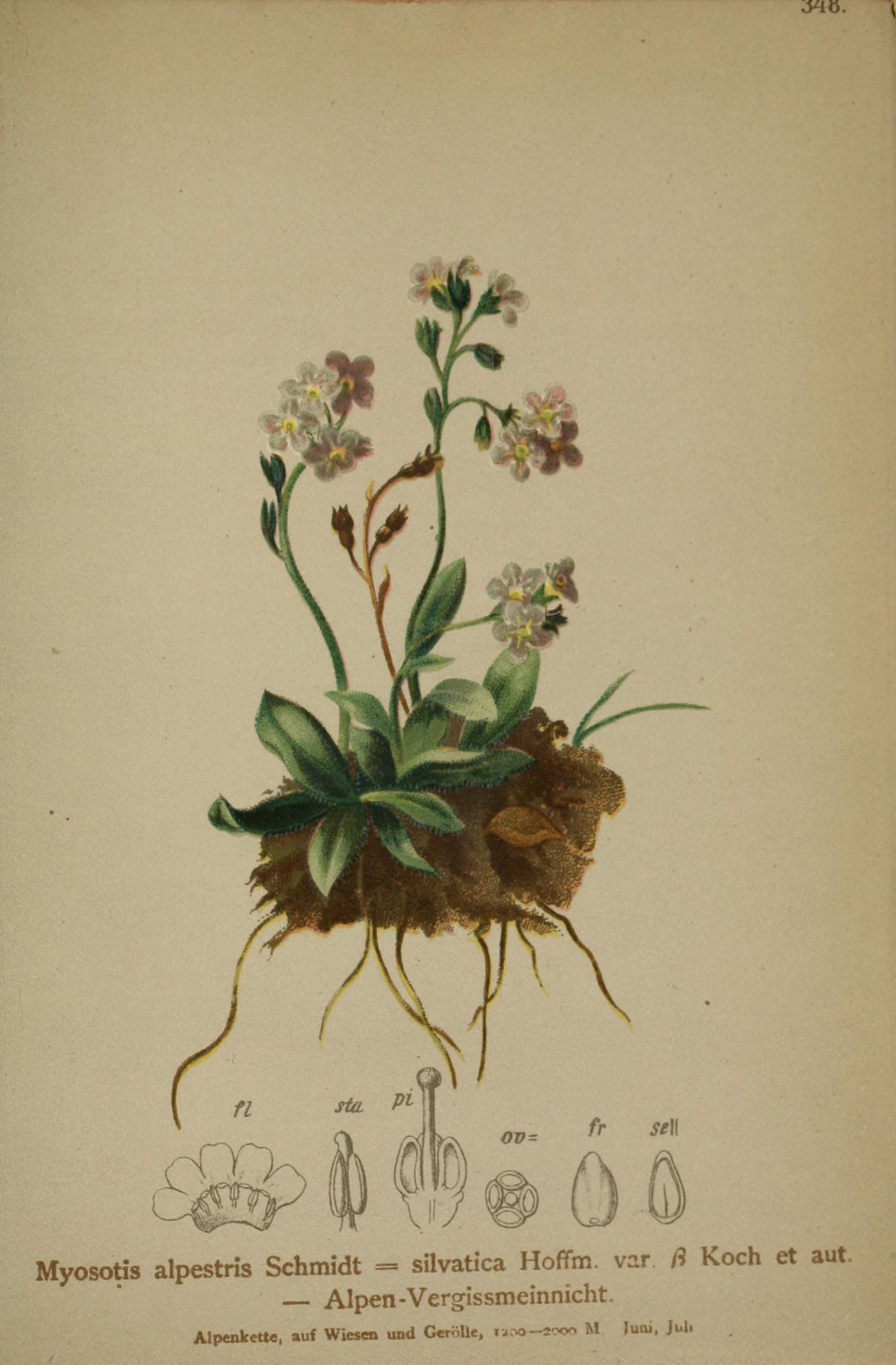 Atlas der Alpenflora / herausgegeben vom Deutschen und Oesterreichischen Alpenverein ; nach der Natur gemalt von Anton Hartinger ; mit Text von K.W. v. Dalla Torre.